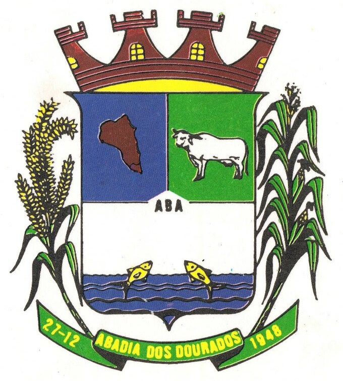 Divulgamos e contamos há historia de Abadia dos Dourados por amor há esse povo, há nossa senhora de Abadia, temos vários site que todos podem ver melhor nosso trabalho. Orkut. Abadia dos Dourados – Minha Paixão Panorâmio. Site Minas: Site Brasil: Léo / MPB / Gustavo